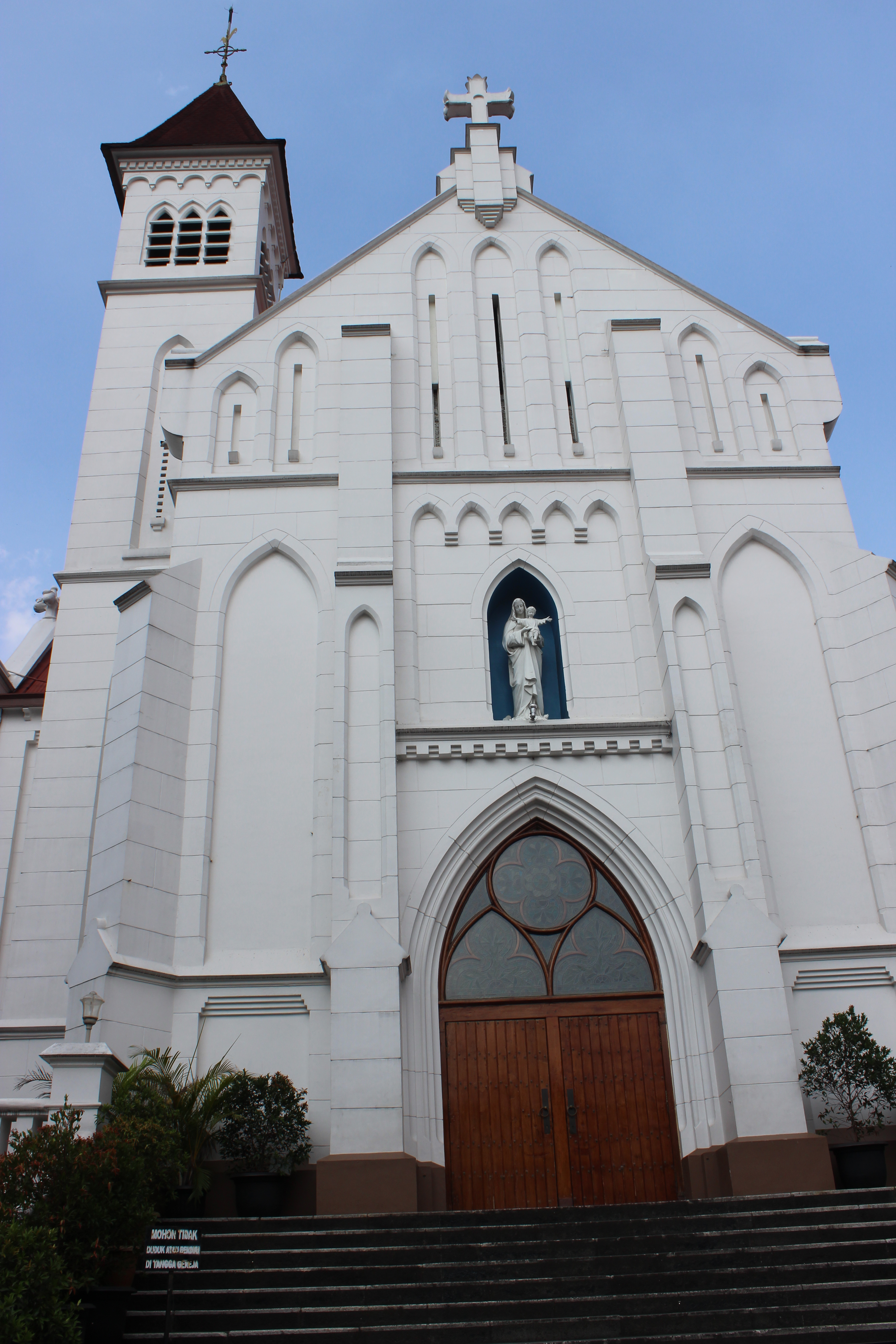 Tampak luar Gereja Katedral Santa Perawan Maria Bogor